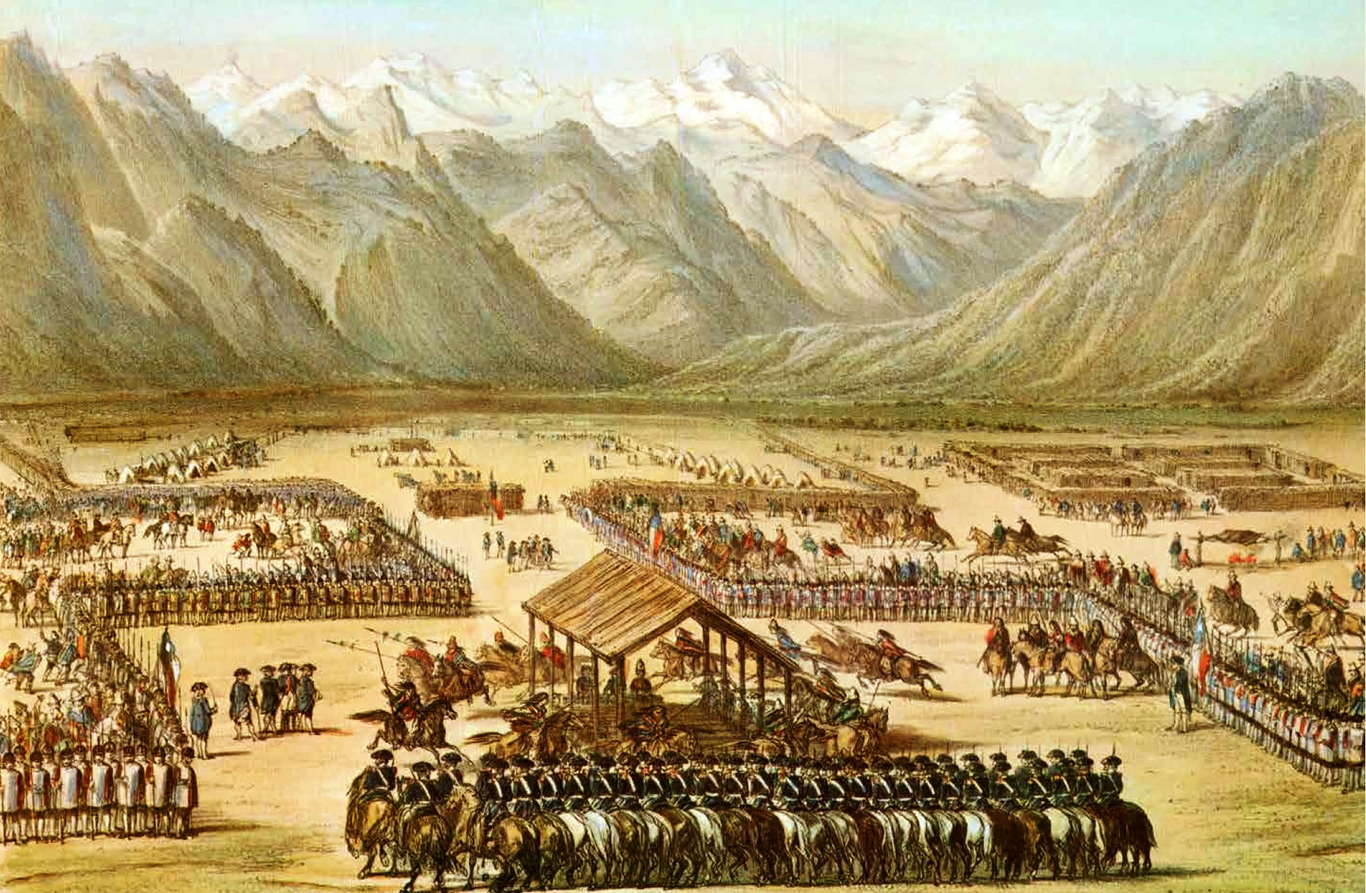 Parlamento de Negrete (1793); junta diplómática de la que emanó un tratado entre las autoridades coloniales españolas de Chile y los principales líderes del pueblo mapuche. La reunión se llevó a afecto del 4 al 7 de marzo de 1793, al borde del Río Biobío, en el vado fronterizo de Negrete, por iniciativa del capitán general y presidente de la Real Audiencia de Chile, entonces llamado Ambrosio Higgins, pero más conocido por la posterior aristocratización de su apellido a O'Higgins. Es considerado habitualmente como el más suntuoso, caro y solemne parlamento diplomático realizado en la frontera chilena del Imperio Español. Publicada por el botánico y naturalista francés Claudio Gay en la página 35 de su Atlas de la historia física y política de Chile, y basada supuestamente en un dibujo del pintor y escultor Ignacio Andia y Varela (1757–1822), parte de la comitiva española que participó en dicho parlamento. Versión coloreada con errores, pues aparece la bandera de Chile, siendo que aún era una colonia de España.